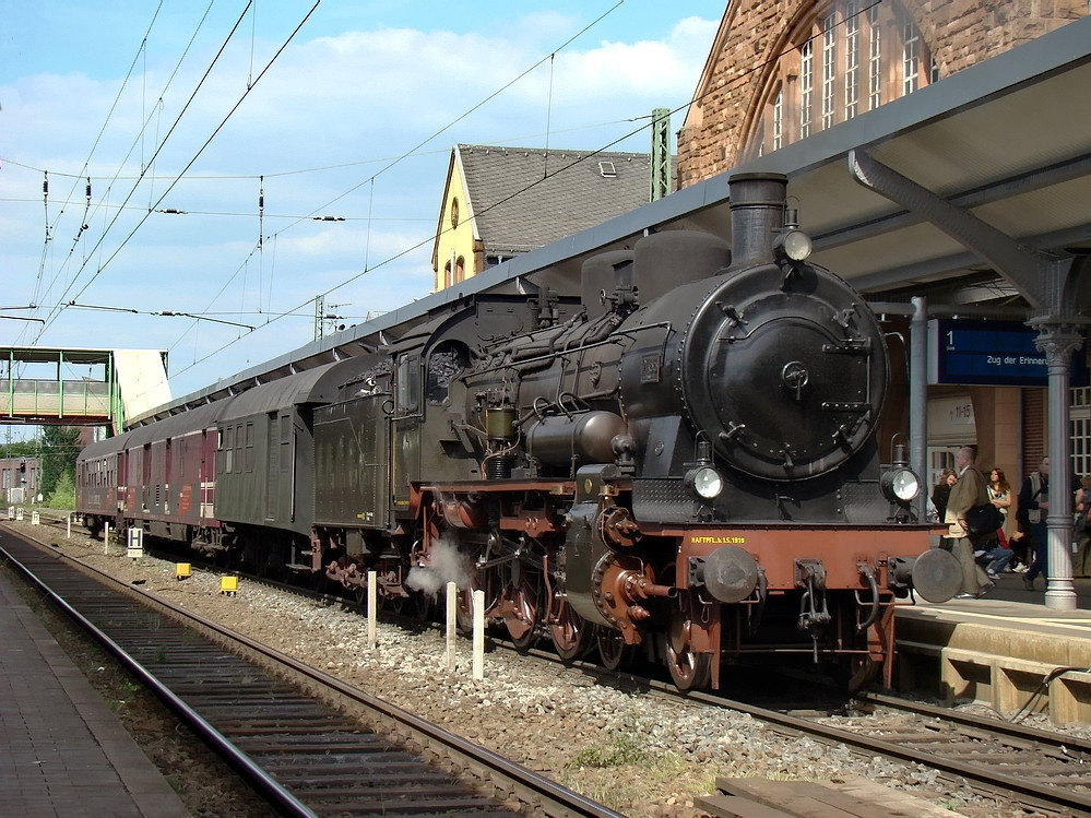 Preussische P 8 Possen 2455 mit Sonderzug in Giessen.